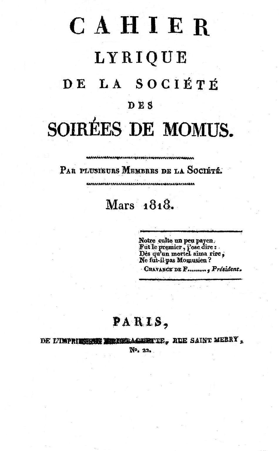 Une publication de goguette où figurent notamment deux textes écrits par Émile Debraux.